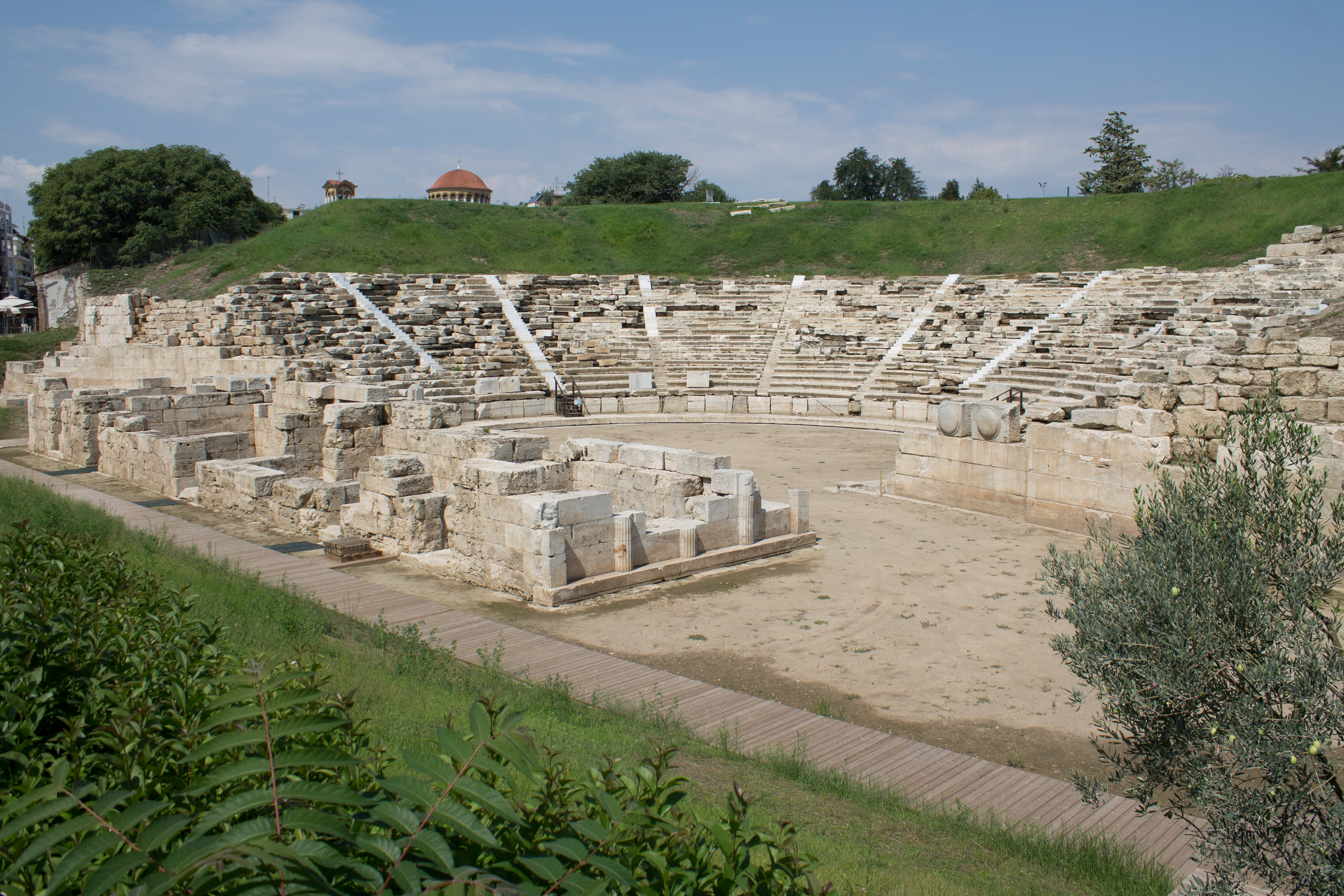 Δεξιά πάροδος, ορχήστρα, κοίλο, δεξιό παρασκήνιο και σκηνή«Πρώτο Αρχαίο Θέατρο Λάρισας»